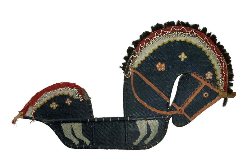 Stokpaard. In gebruik geweest bij volksfeesten in Yogyakarta. De deelnemers van het kuda kepang spel (rejog) zijn bewapend met houten toernooilansen.. Stokpaard van gevlochten bamboe Unknown language: Kuda kepang Jaranan